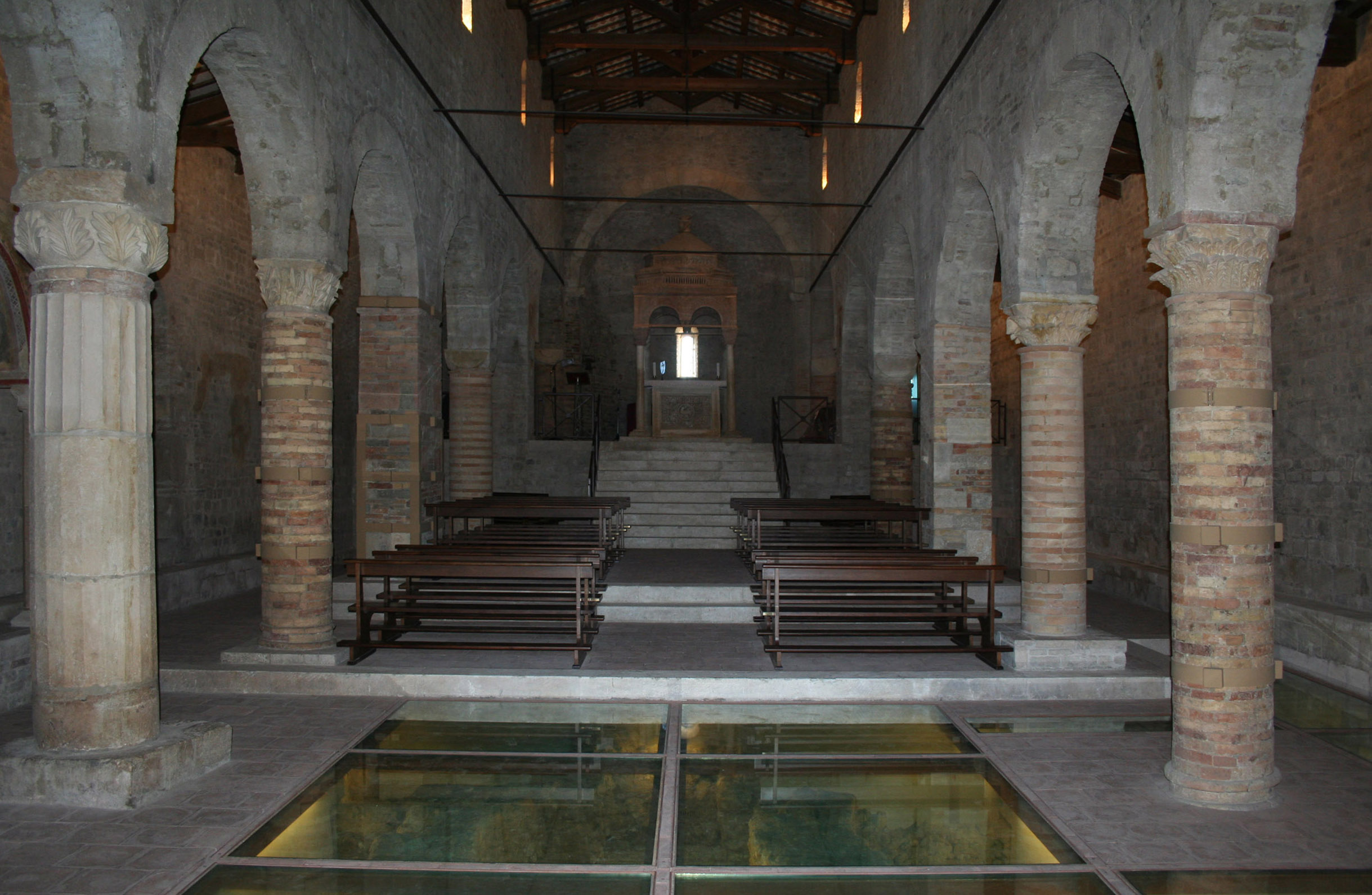 Chiesa di San Clemente al Vomano, interno dell'edificio religioso appartenente al complesso abbaziale omonimo nel paese di Guardia Vomano in provincia di Teramo, Abruzzo, Italia.